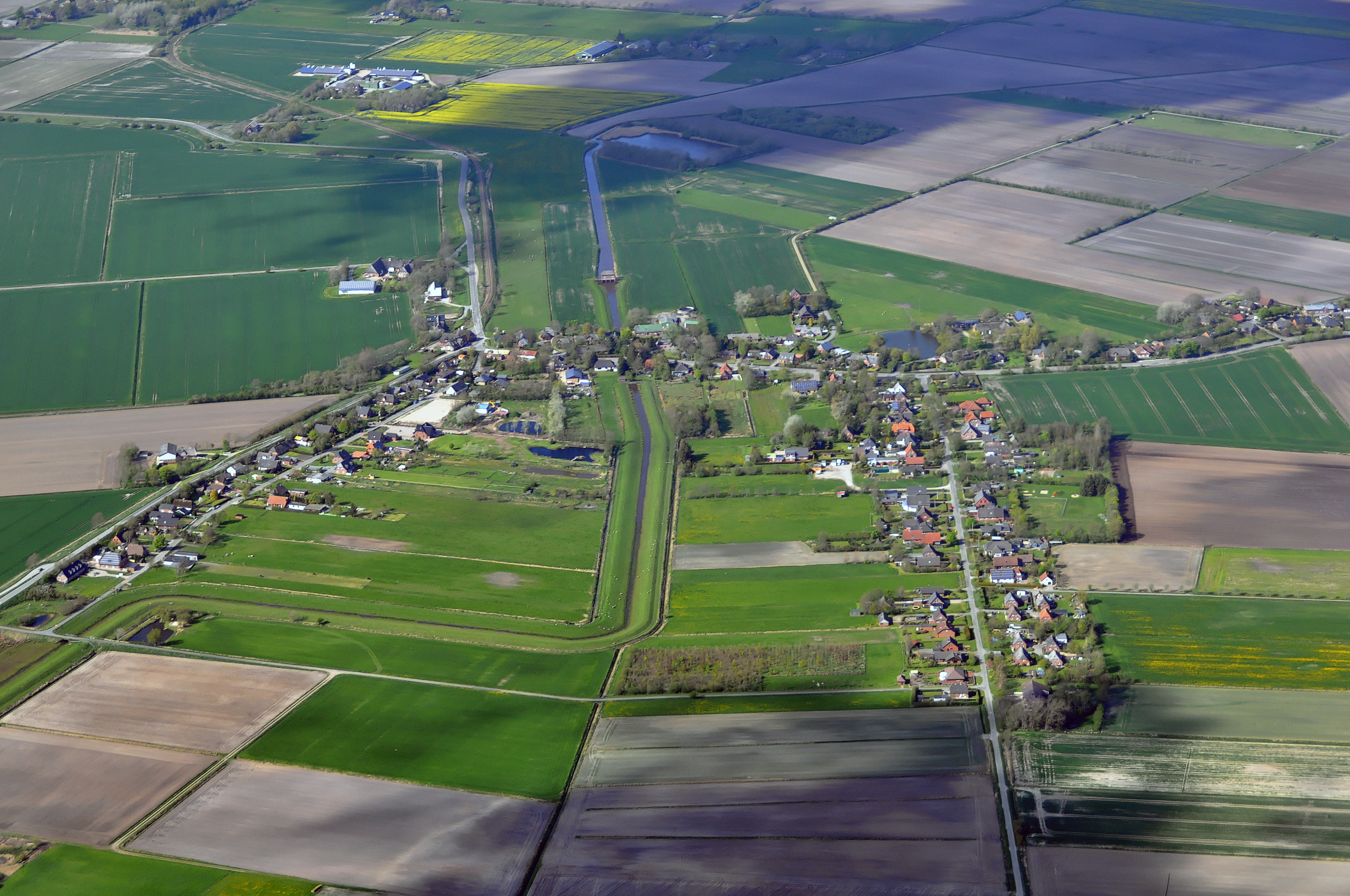 Luftbilder von der Nordseeküste 2012-05